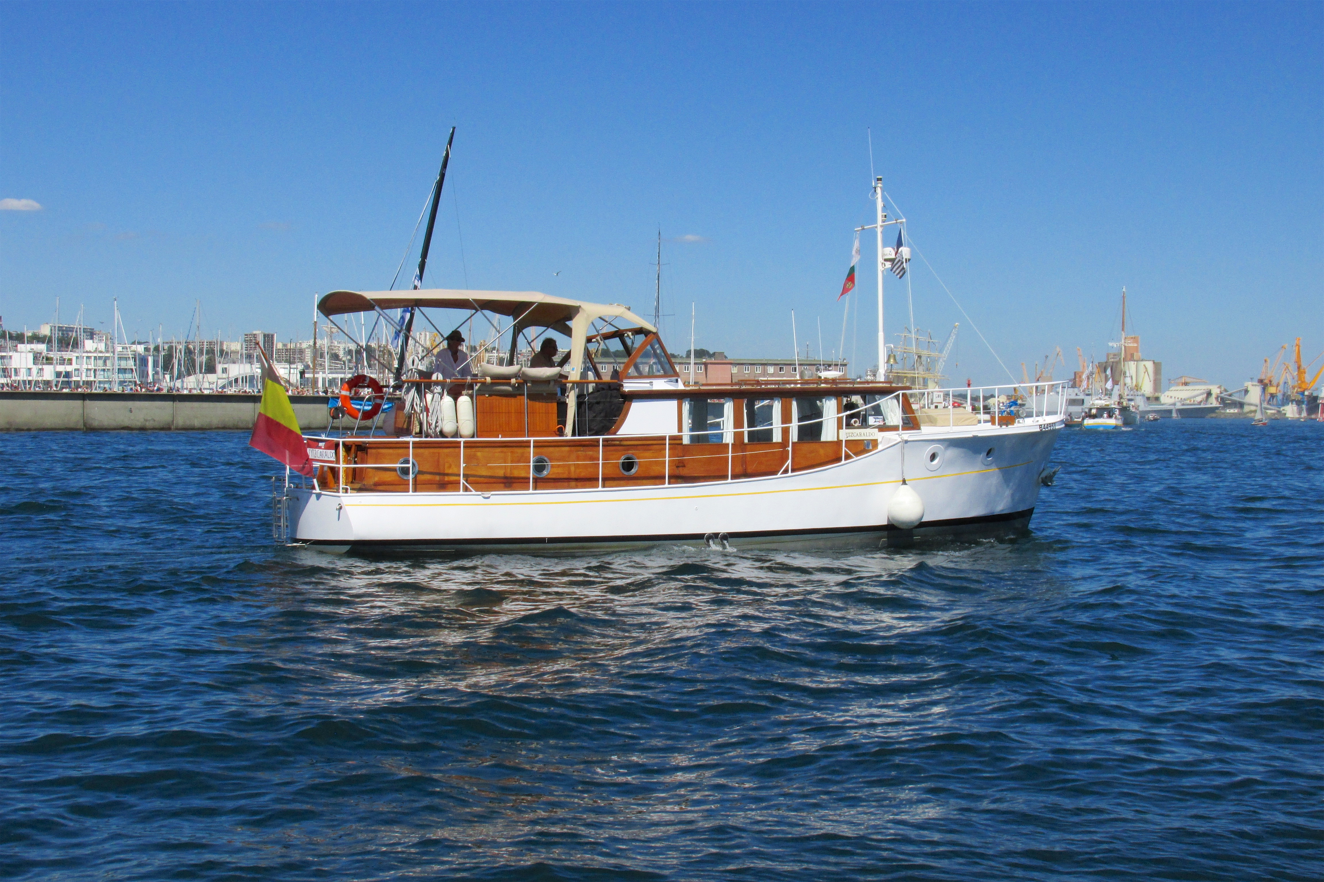 Fitzcaraldo